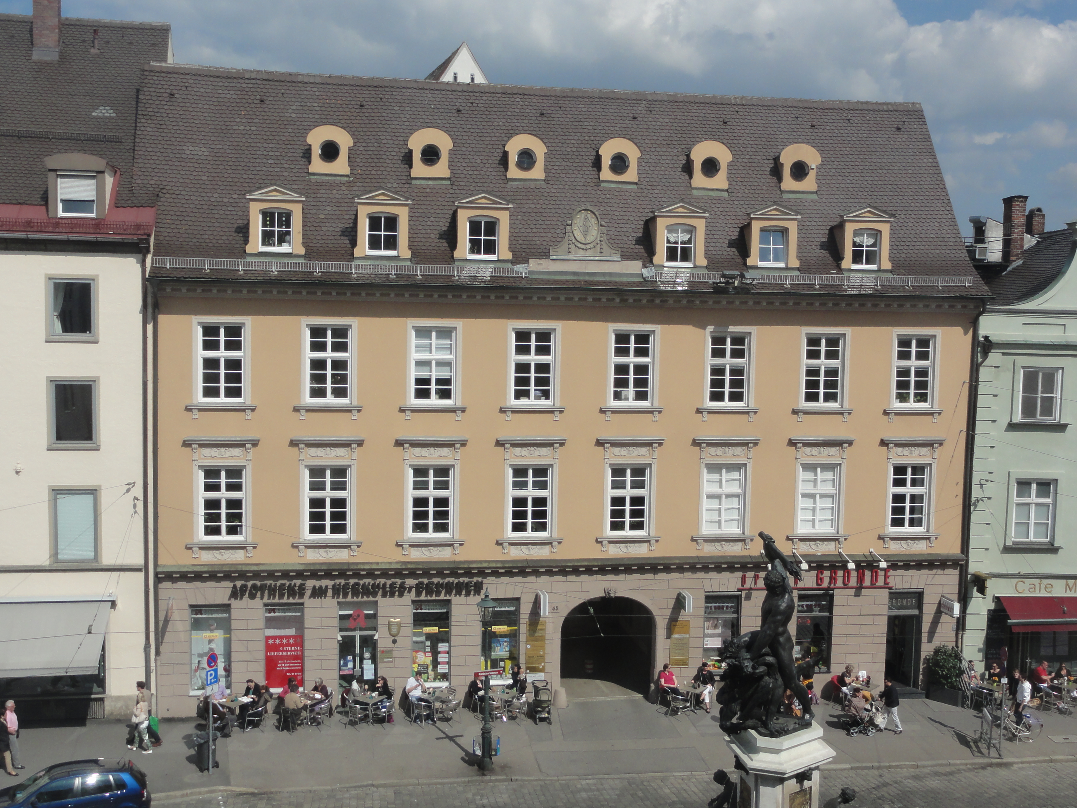 Augsburg, Maximilianstraße 65 mit Herkulesbrunnen